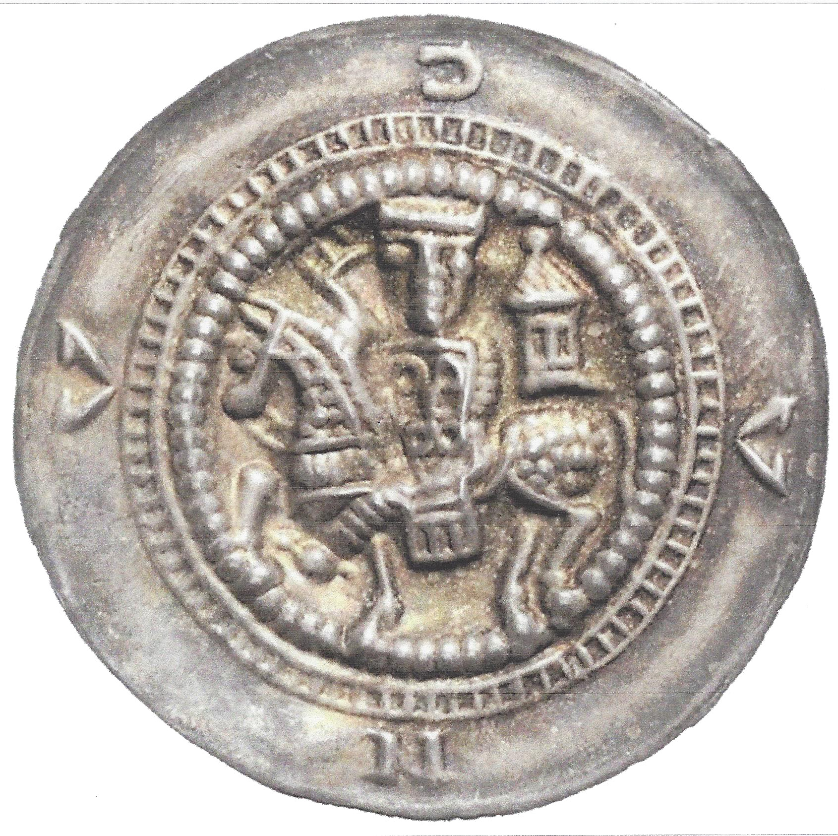 Münze